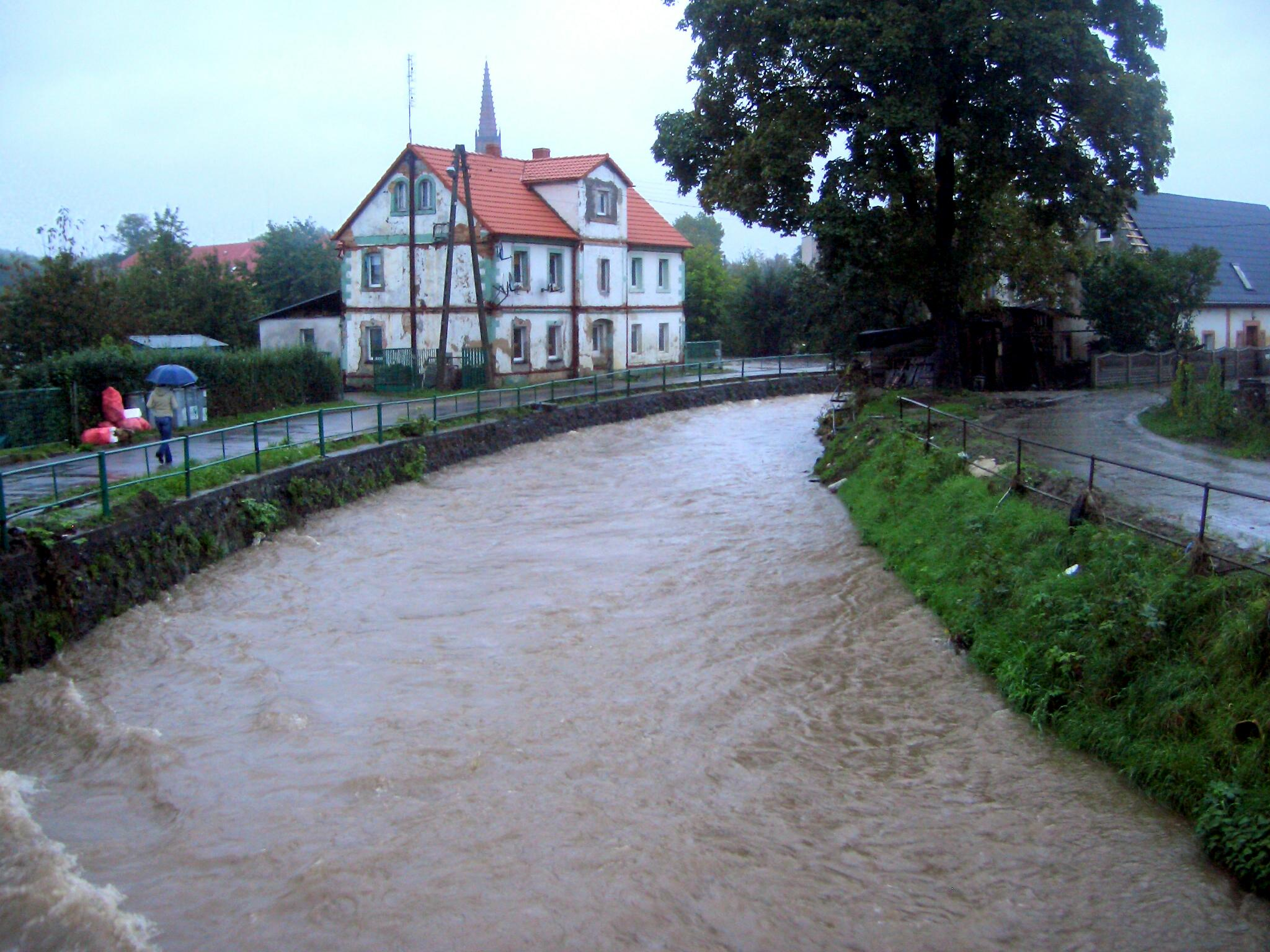 Der Erlichtbach (polnisch Miedzianka) in Bogatynia kurz vor der Vereinigung mit dem Schladebach zum Fluss Küpper